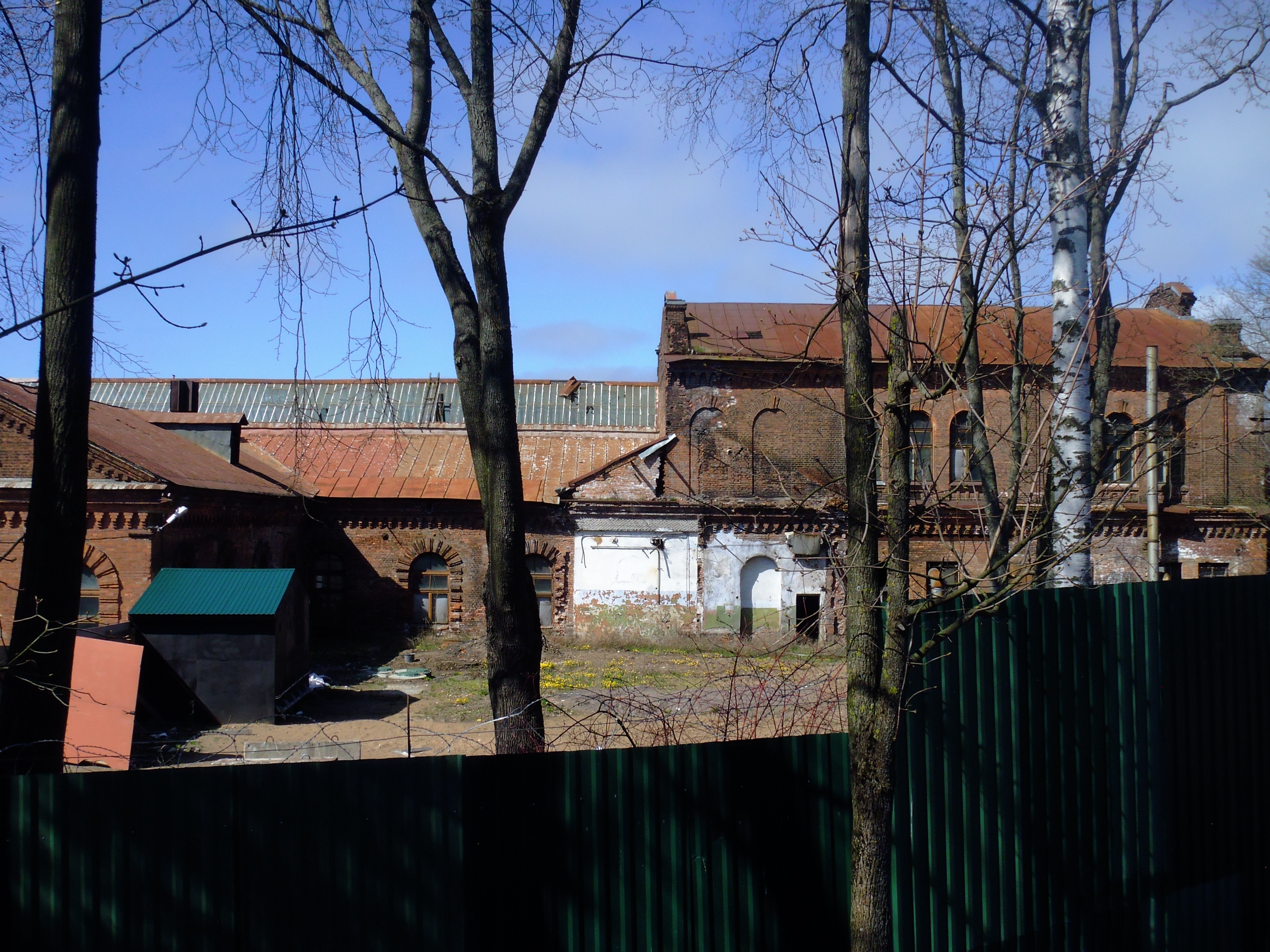 Сестрорецк СПб. Петровский Арсенал, здание гидроэлектростанции в 2015 году. Памятник промышленной архитектуры, находится под охраной КГИОП СПб.